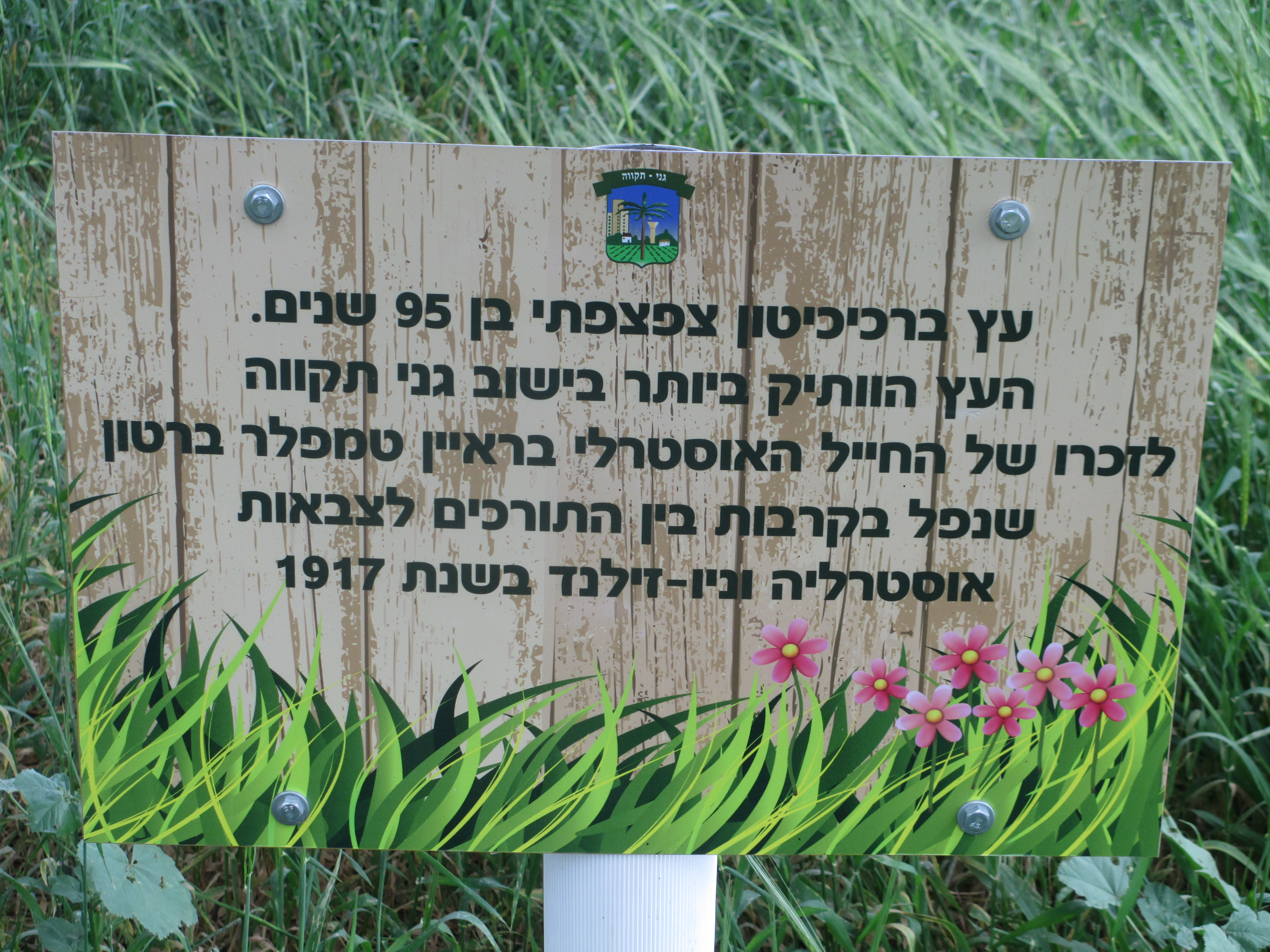 שלט זיכרון לחייל בריאן טמפלר ברטון בגני תקווה